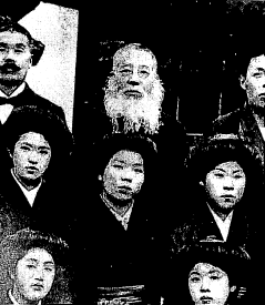 淡路高等女学校校長時代の寛堂と教え子。卒業式のとき撮ったもの。 洲本高等学校蔵